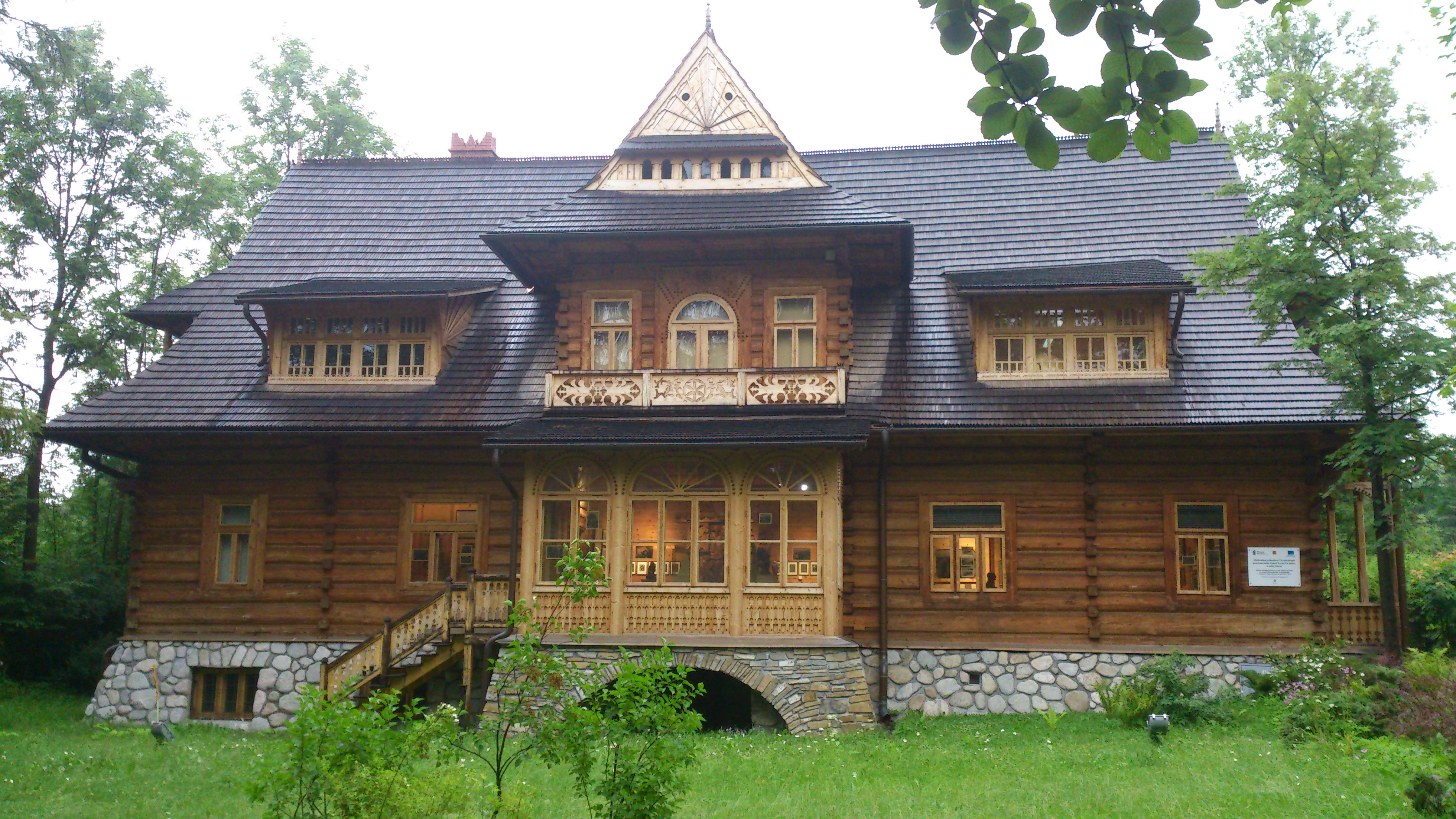 Willa Oksza, Zakopane